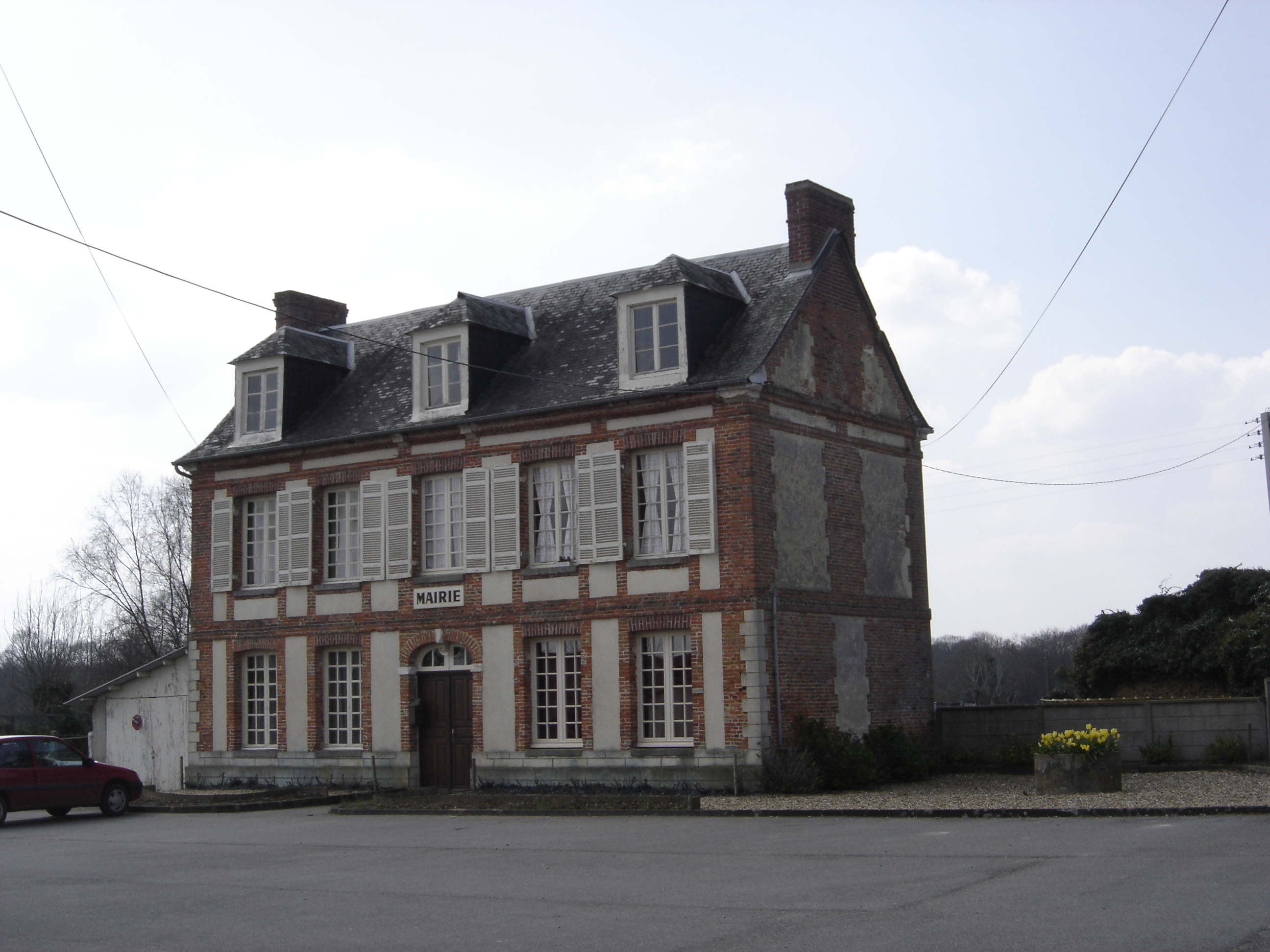 Mairie de Vannecrocq - Eure - France